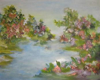 Paisaje en Oleo